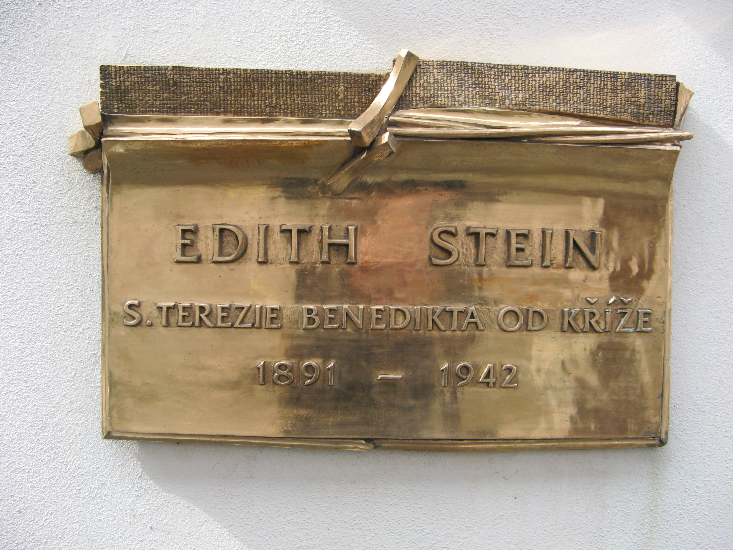 Pamětní deska Edith Stein, U Pernikářky 111/2a, Praha-Smíchov.